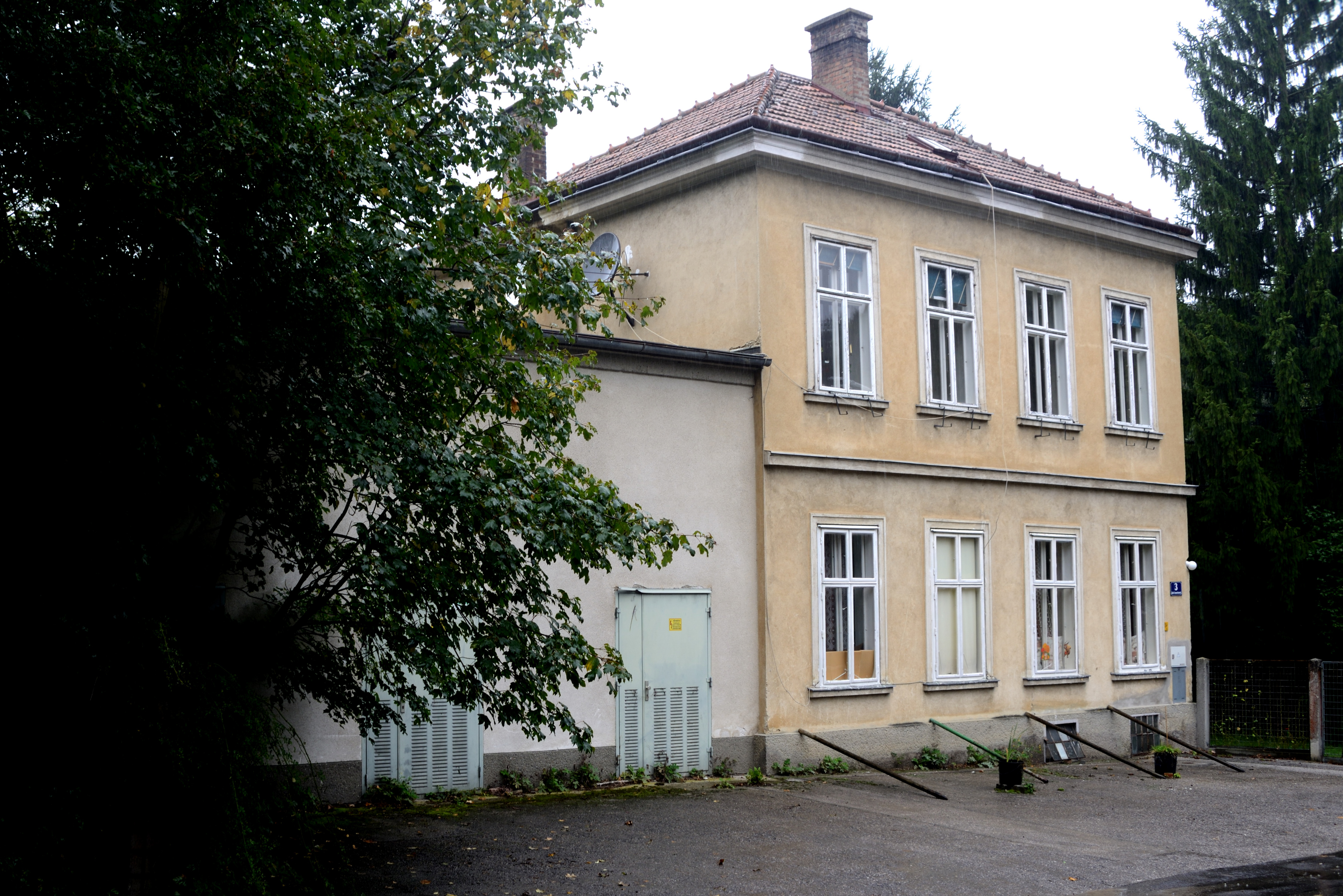 Ehemalige O-Bus-Garage in Kalksburg, Jakob-Sommerbauer-Straße ONr. 3